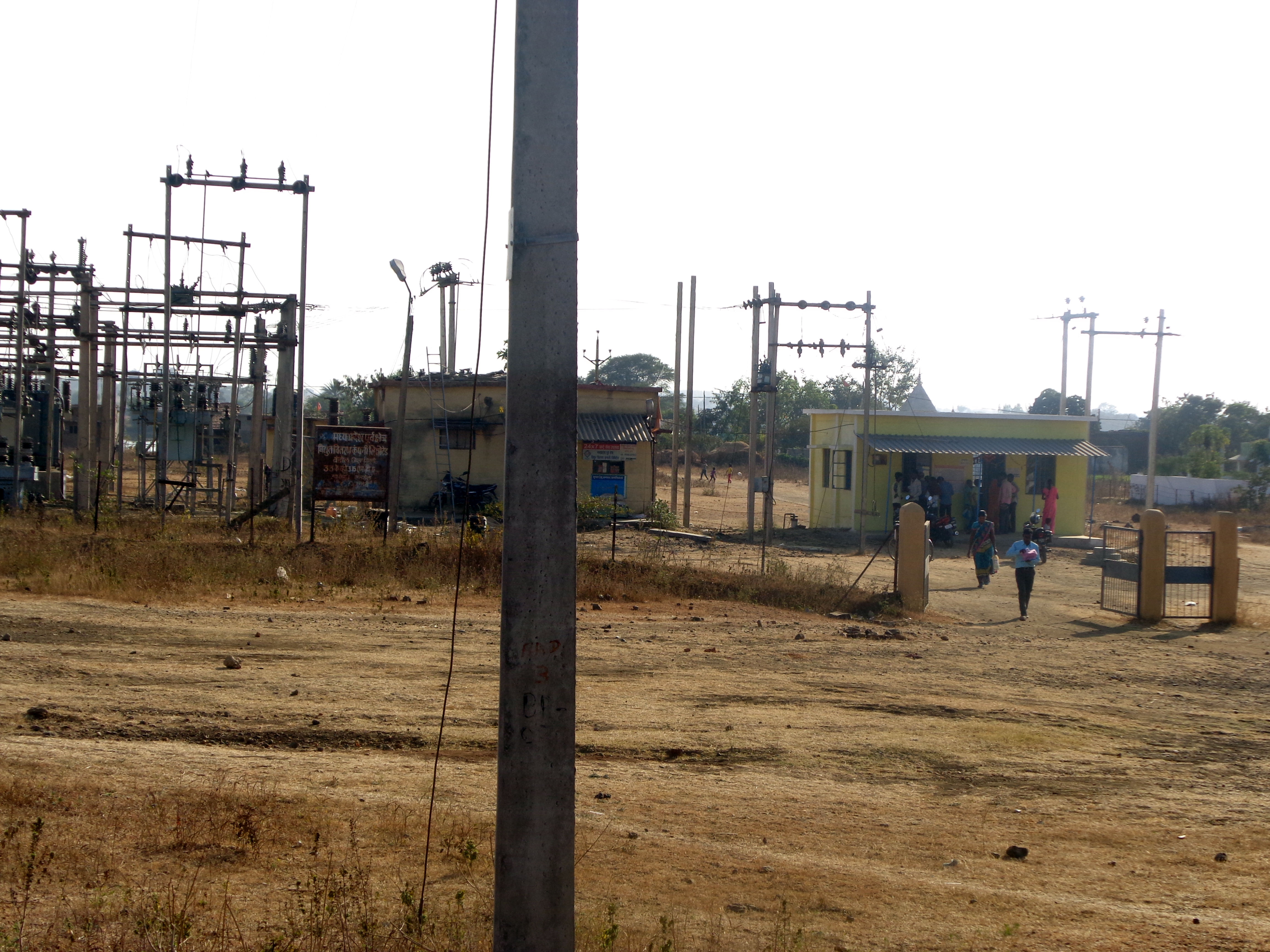 hi:बंडोल: कार्यालय कनिष्ठ अभियंता बिजली विभाग